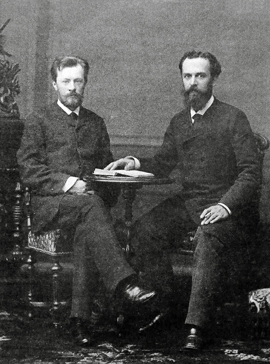 Владимир Шухов и Александр Бари, 1880-е.